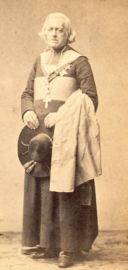 Eugène de Mazenod (1782-1861), évêque de Marseille.